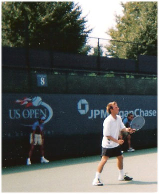 self made picture